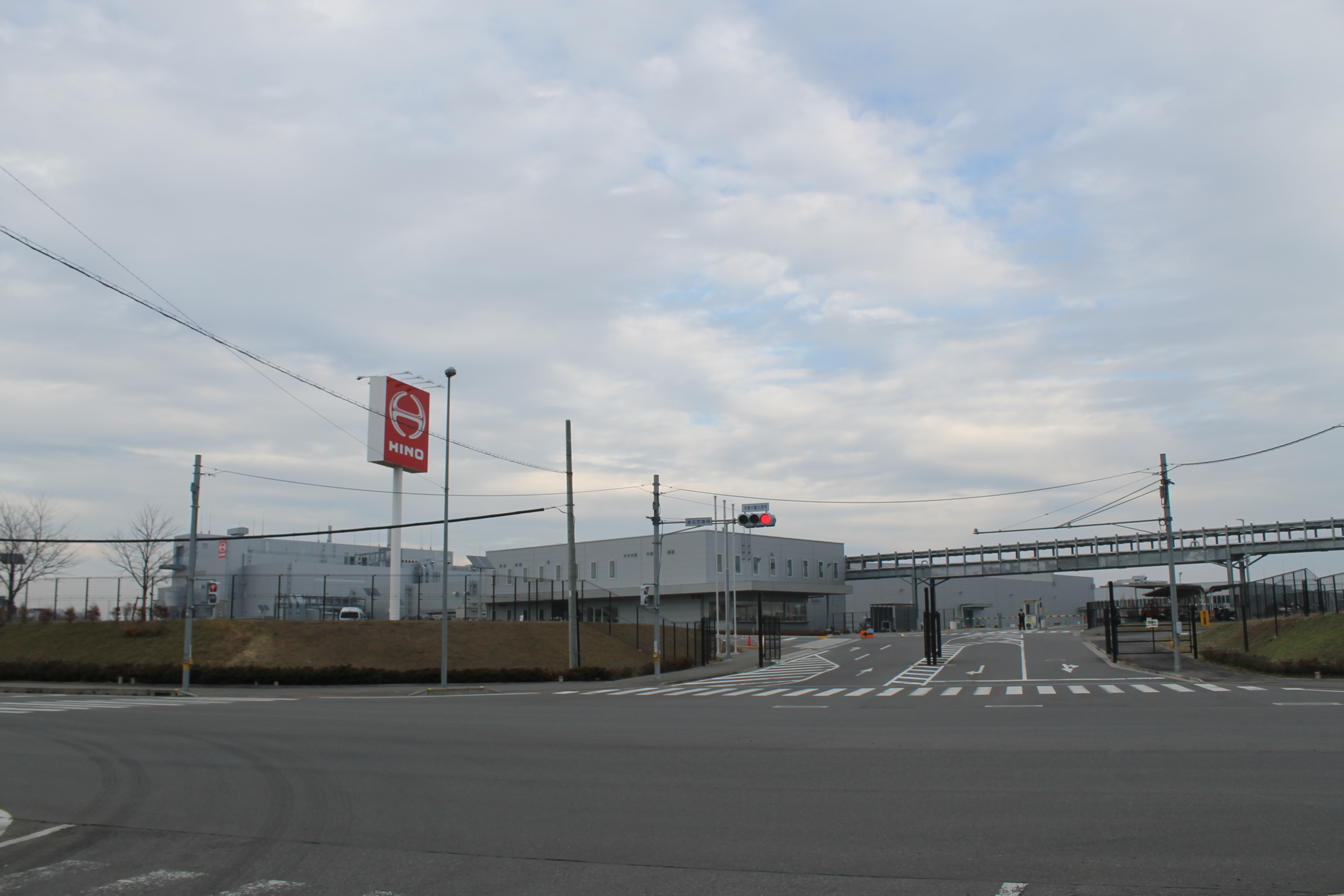 日野自動車 古河工場（2018年12月撮影） かつてのNTT名崎送信所の跡地に建設